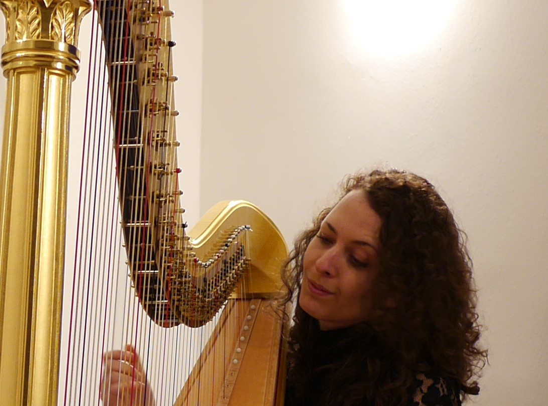 KlangBildGespräch in der "Klangwerkstatt". Milo Lohse (Hamburg) präsentiert sein Bild "Veritables Aquarelles flasque" (Penser á Erik Satie), dazu erklingt Musik von Erik Satie von Hanna Rabe (Harfe) und Dr. Jörg-Peter Mittmann (Oboe d'amore).